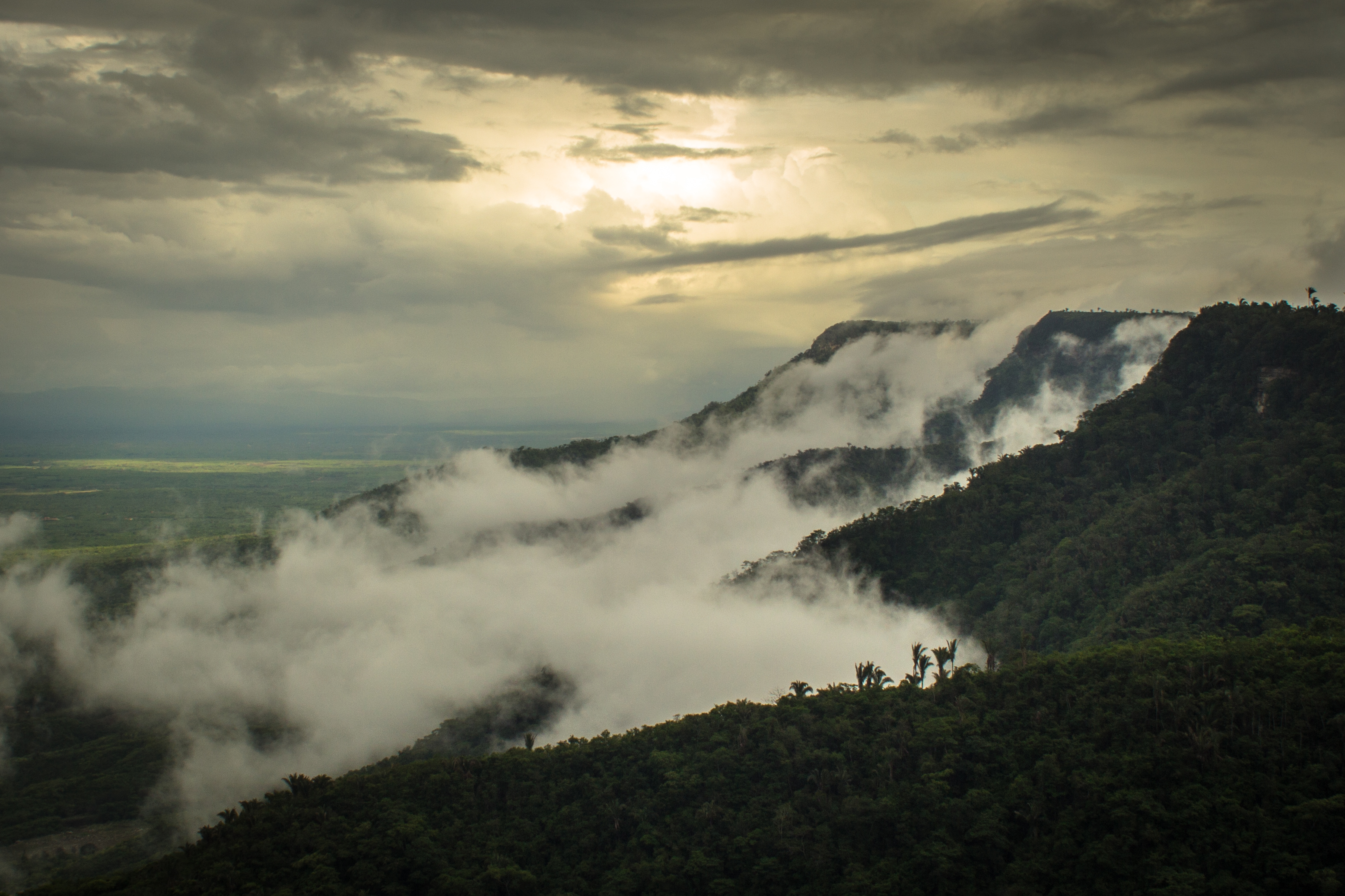 Essa foto foi feita na região de Ibiapina, cidade que fica na chapada Ibiapaba, Ceará. A neblina toma o lugar depois de uma leve chuva